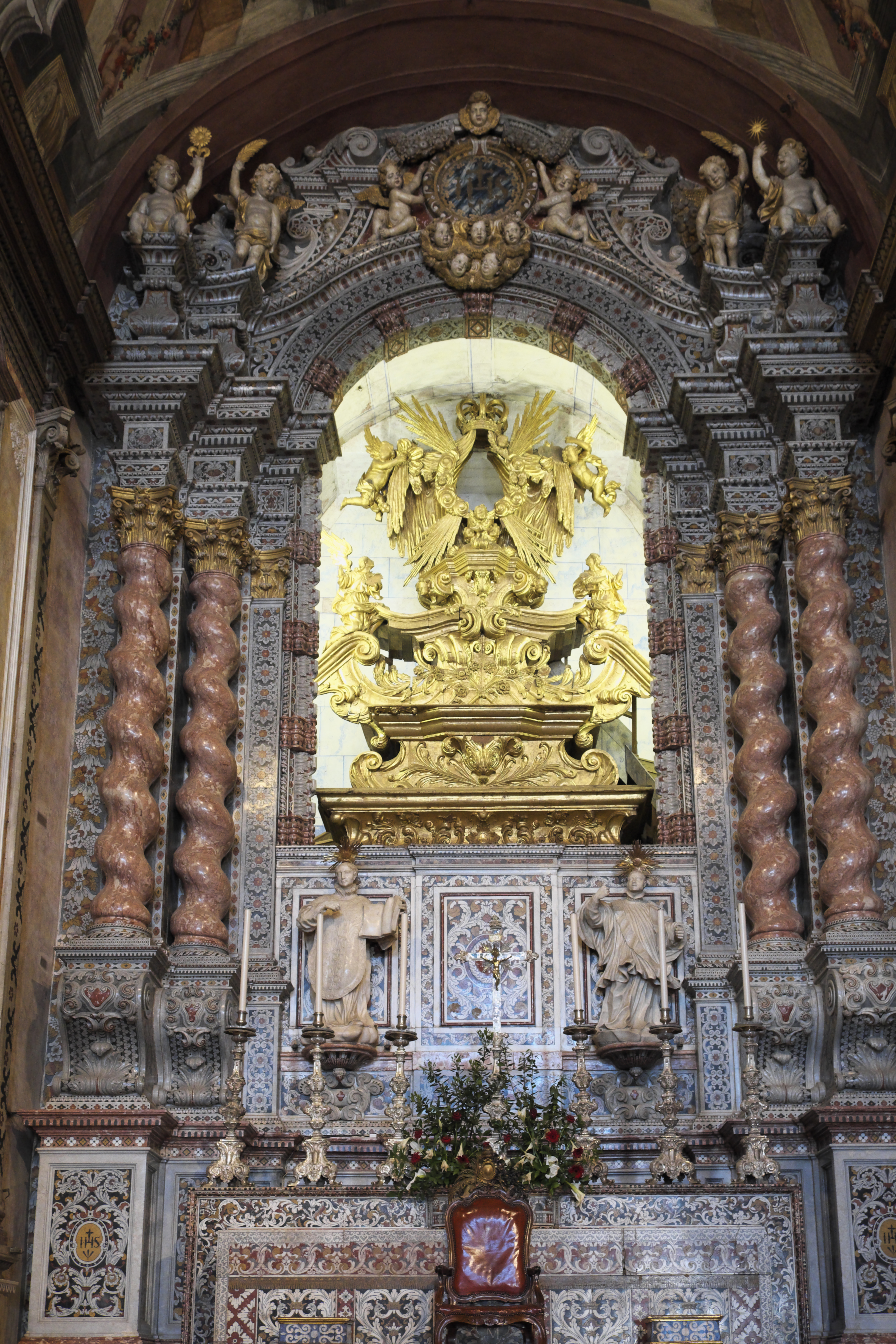 Kathedrale Sé (Nossa Senhora da Conceição do Colégio dos Jesuítas) in Santarém in Portugal, Hauptaltar